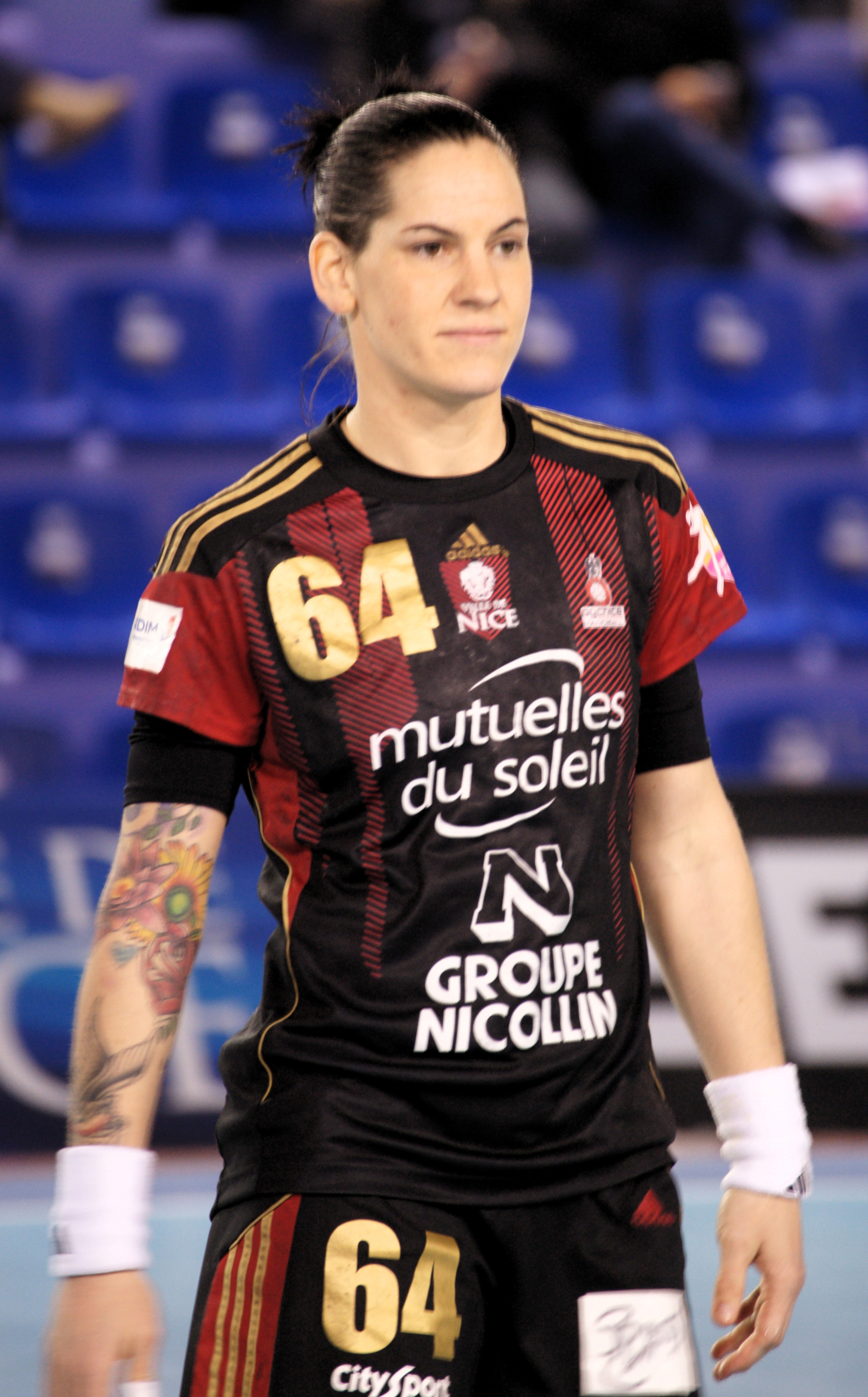 Alexandra Lacrabère, OGNH-Issy Paris 2016